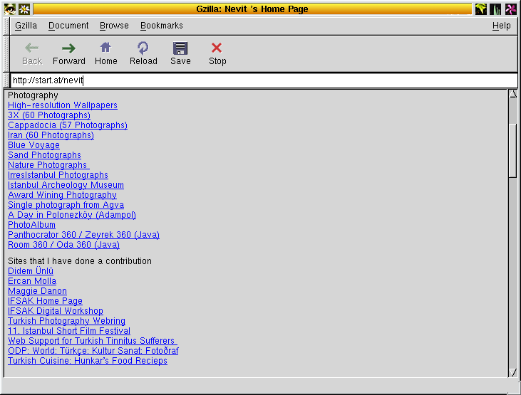 Gzilla